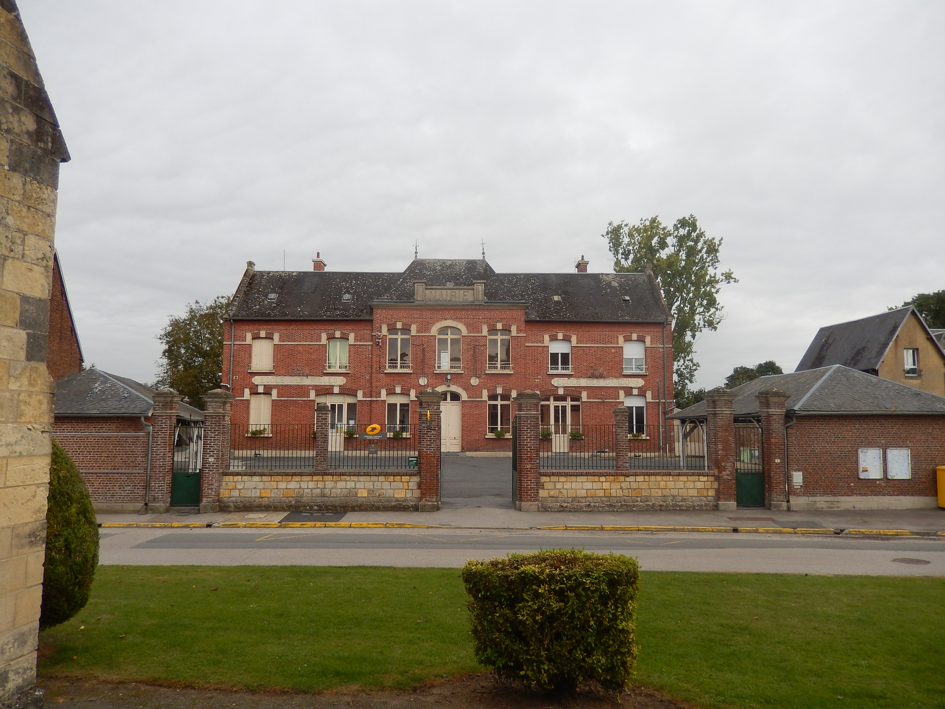 Matigny - la mairie